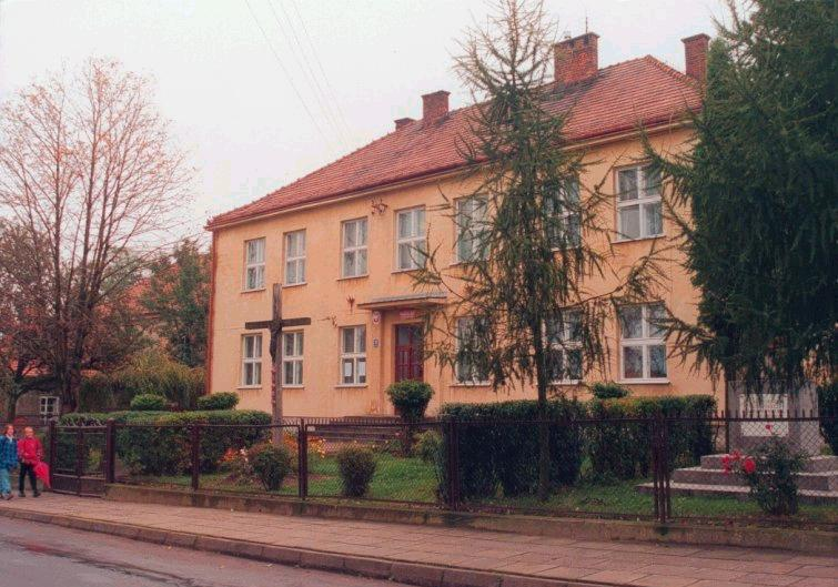 Sp.